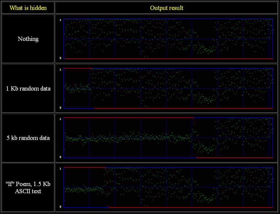 chi-square image tests